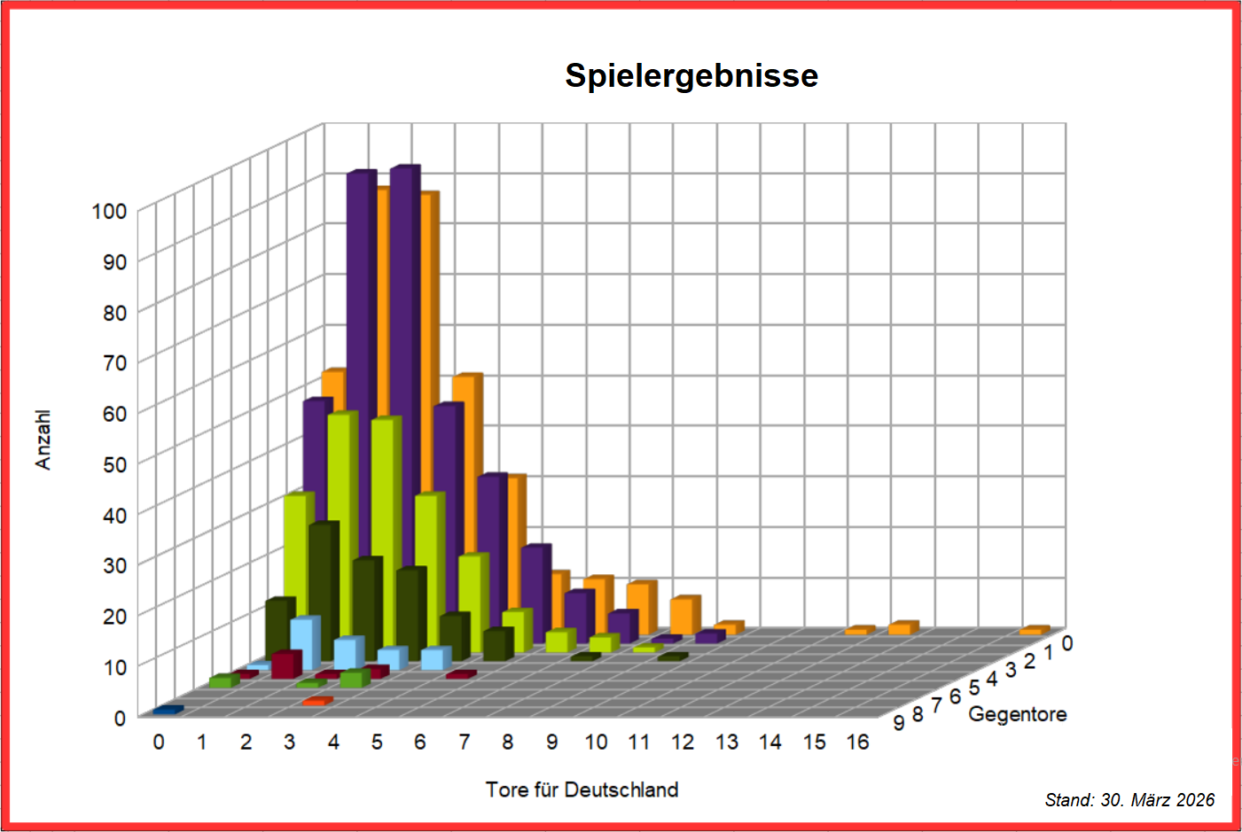 Spielergebnisverteilung der deutschen Fußballnationalmannschaft, Stand 11.8.2010